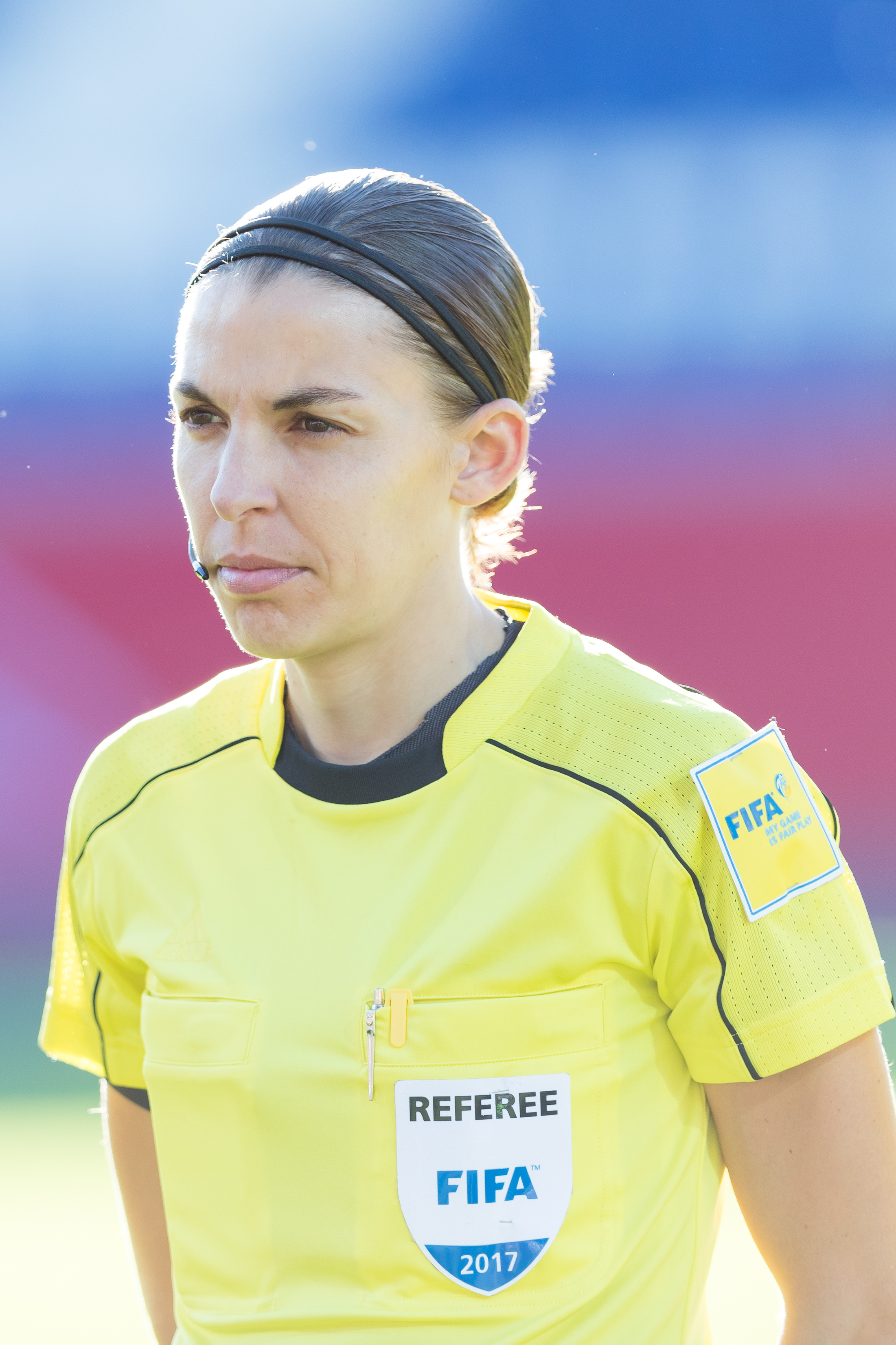 during Fussball Frauen Deutschland vs Island at Brita-Arena, Wiesbaden, Hessen, Germany on 2017-10-20, Photo: Sven Mandel